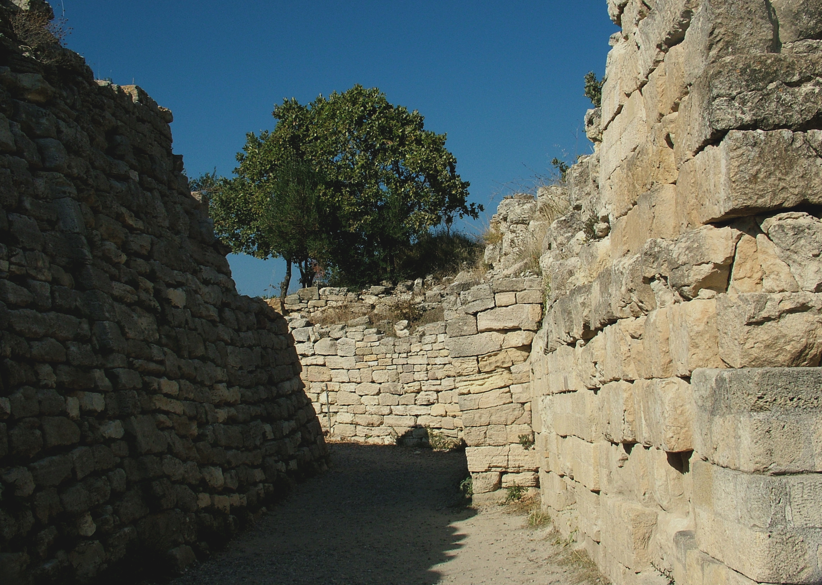 Trójai régészeti terület